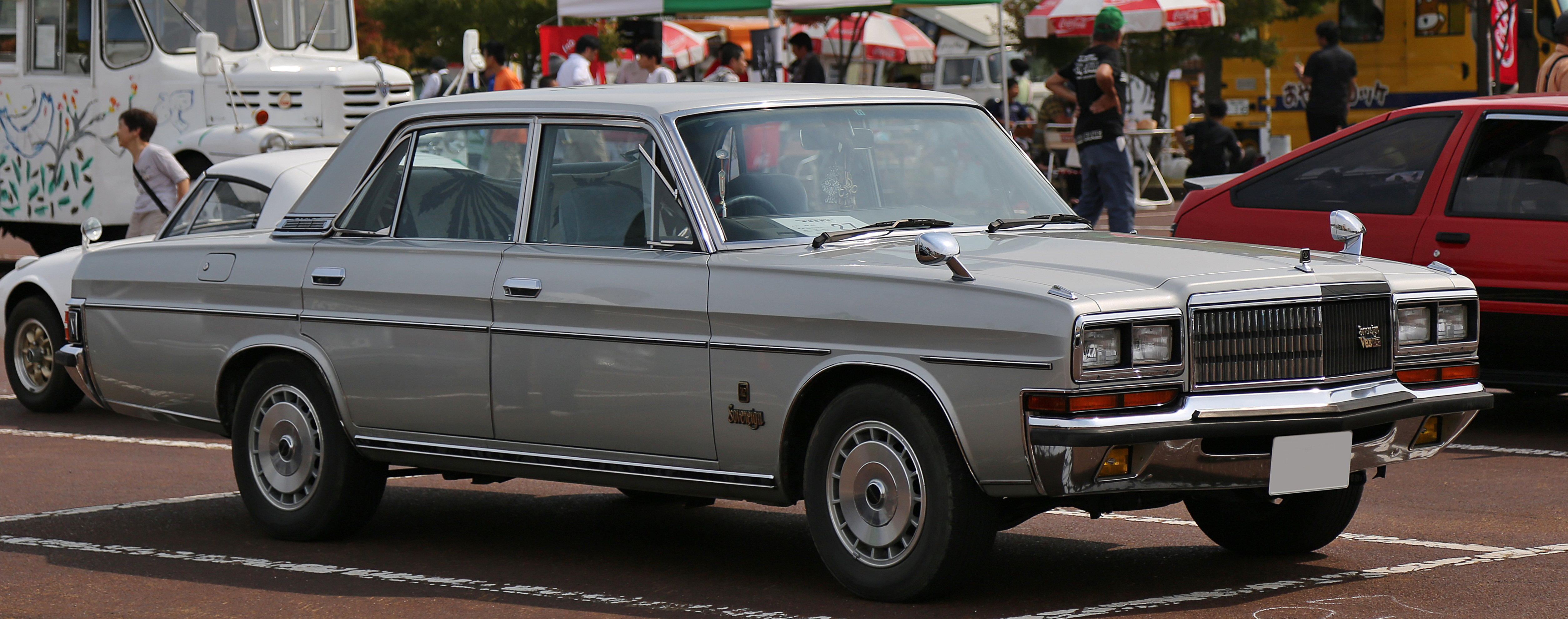 Nissan E-H252